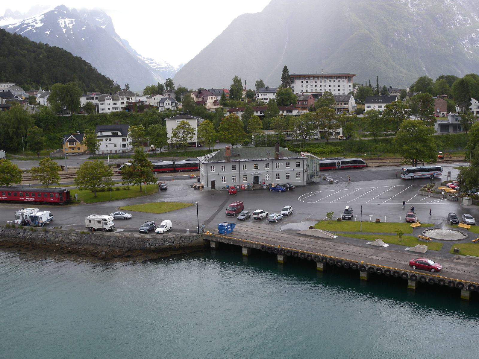 Hafen von Andalsnes - Ablegen des Schiffes